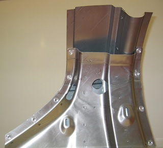 Rührreibpunktschweißen von Blechbiegeteilen